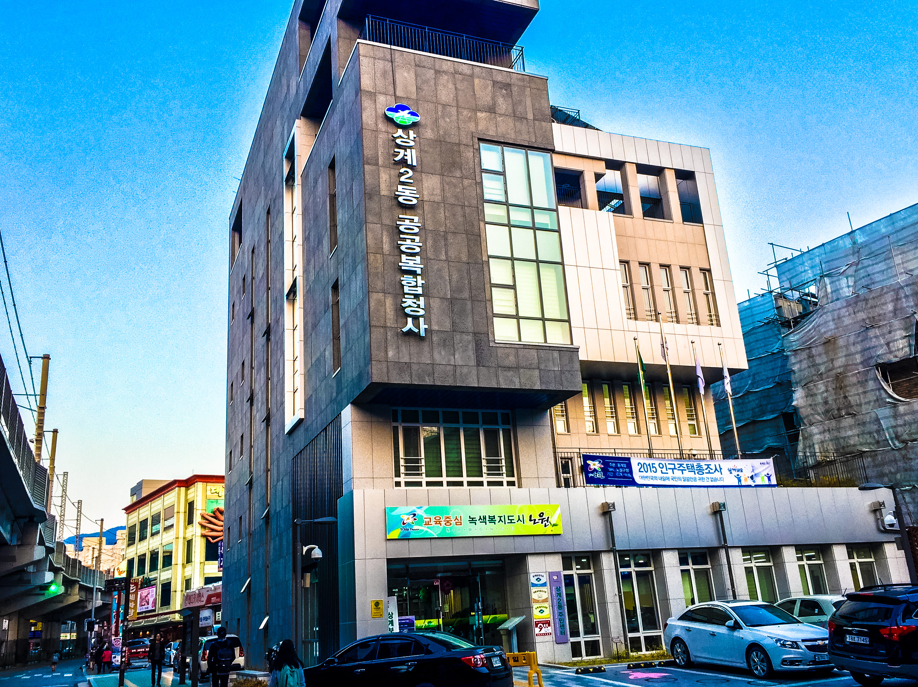 상계2동주민센터 (노원구)